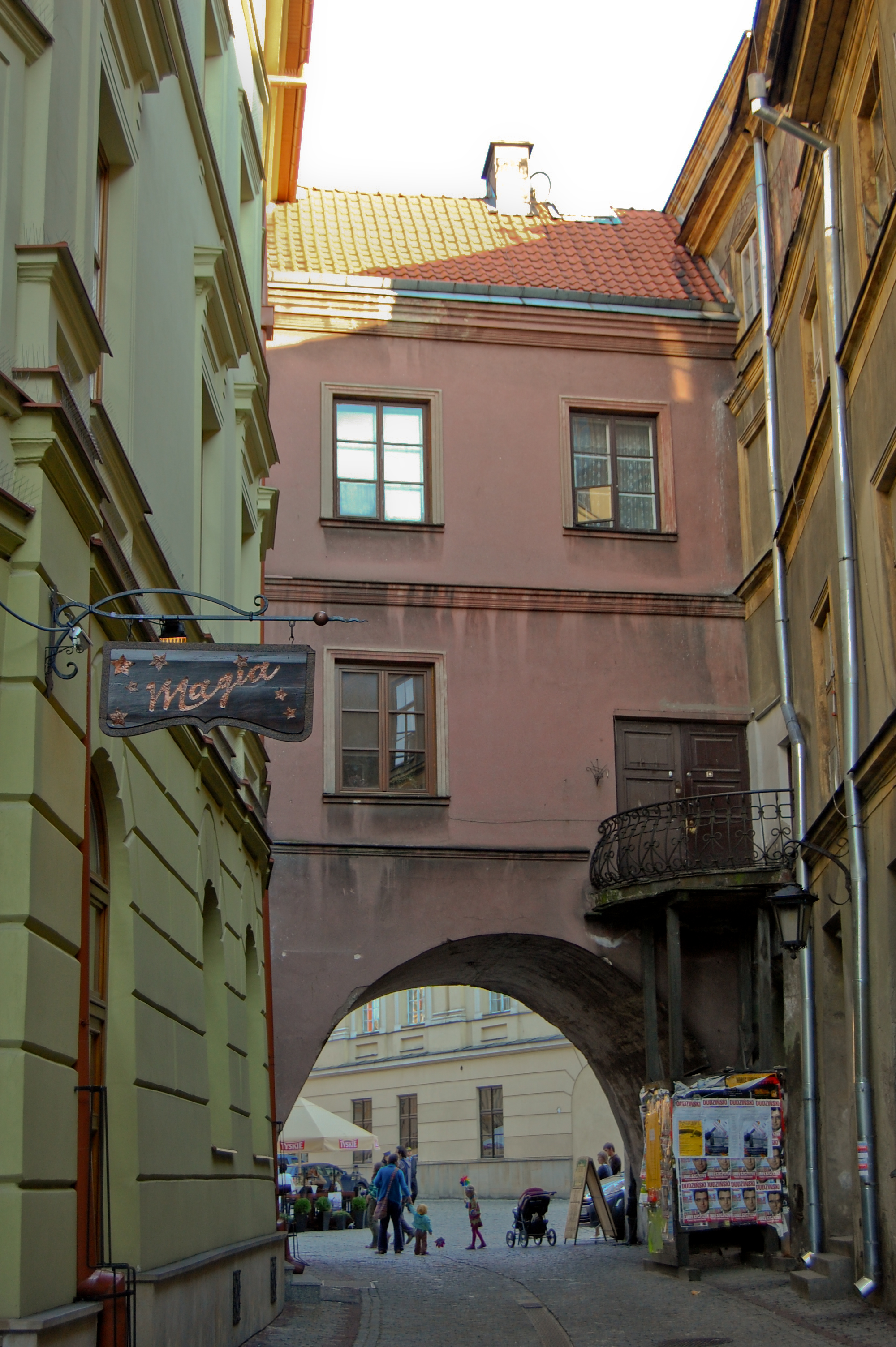 Stare Miasto w Lublinie, Brama Rybna. Widok w stronę Rynku i Trybunału Koronnego.